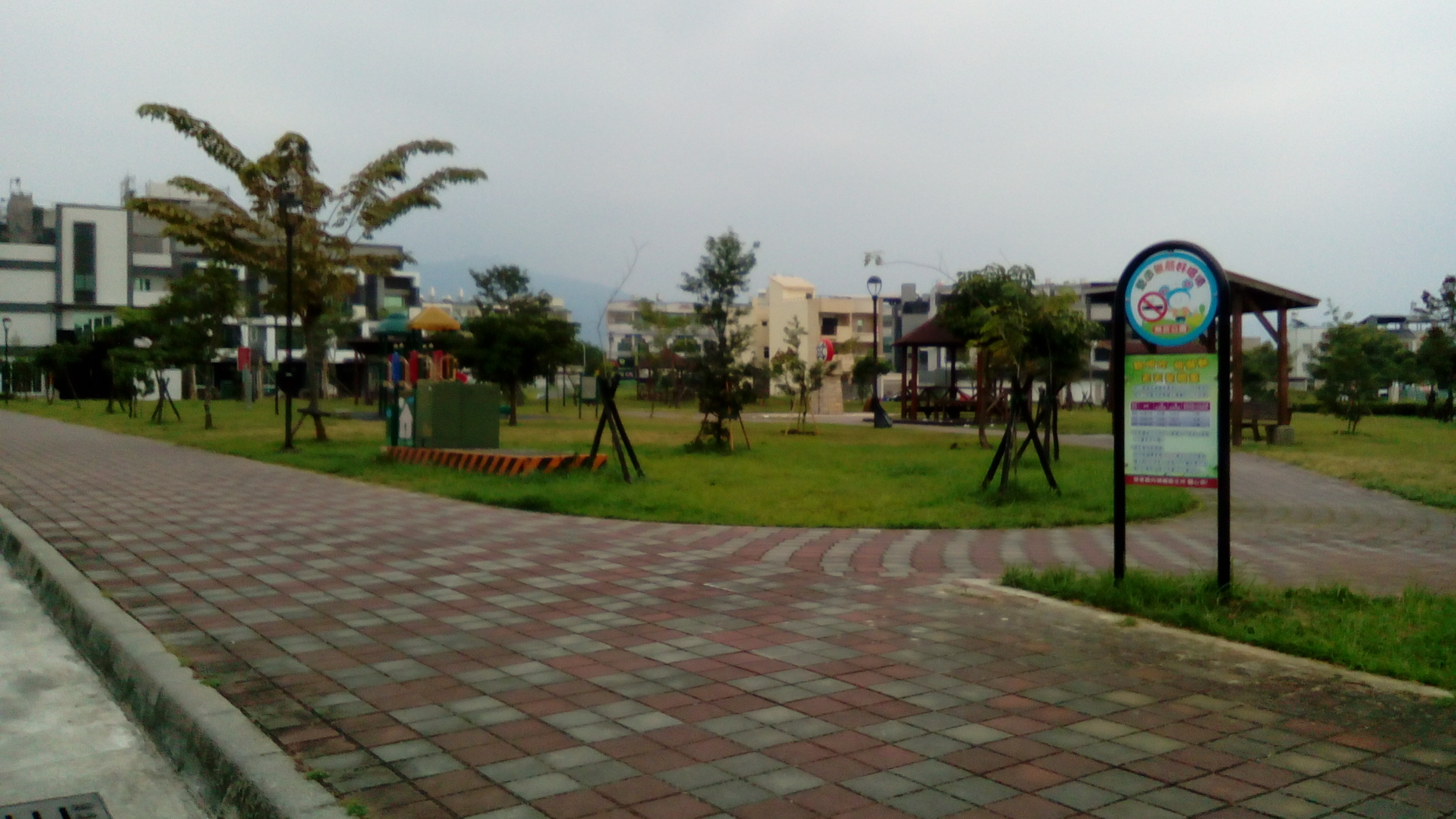 位於187縣道上 近屏科大 市區東側